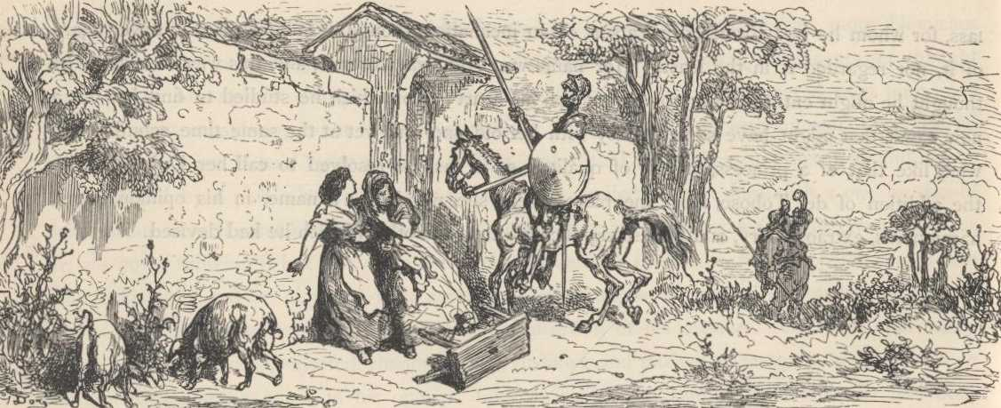 Illustration for Miguel de Cervantes’s “Don Quixote“ by Gustave Doré, 1863